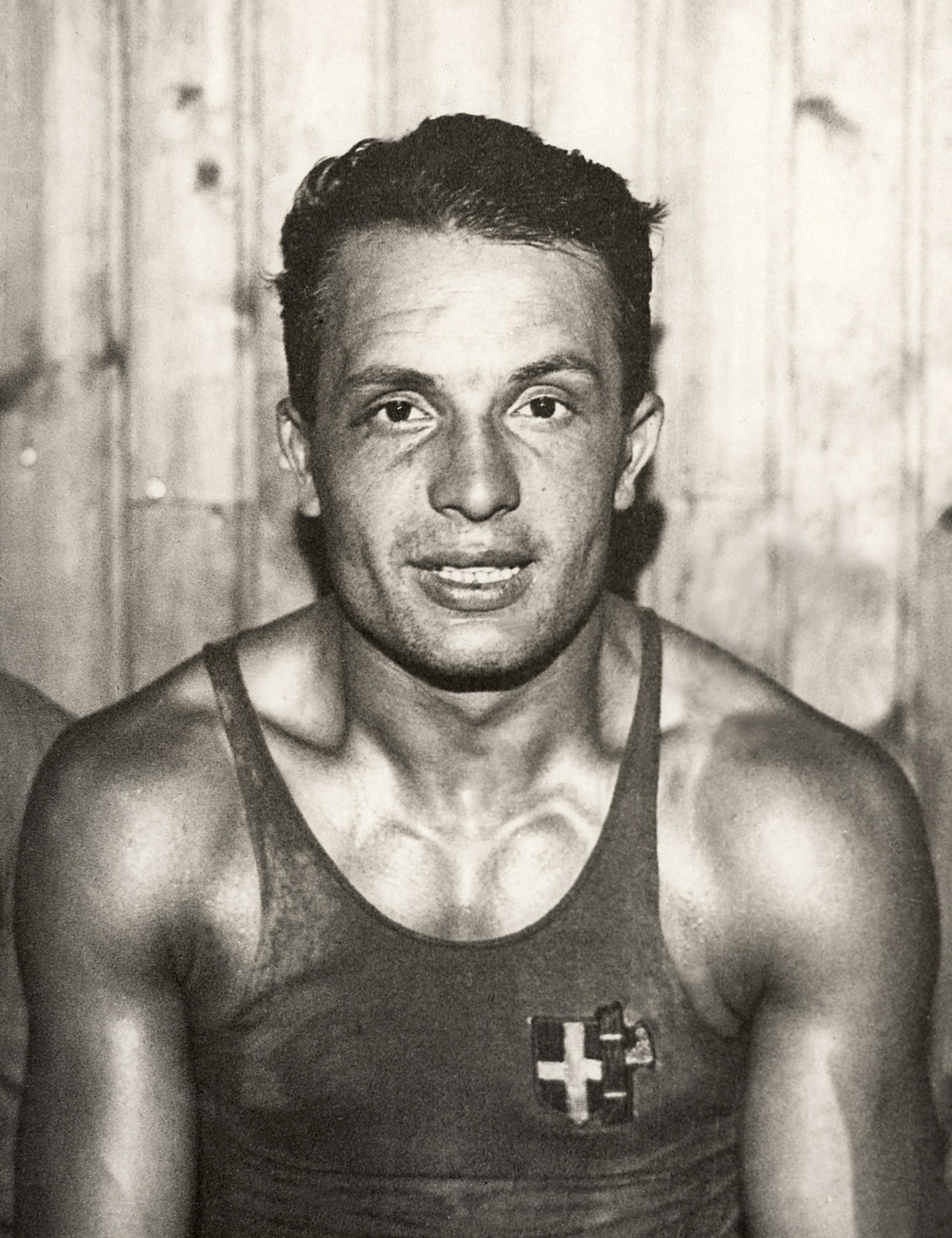 Sport, Olympische Spelen 1928, Amsterdam : De Italiaan P. Toscani, olympisch kampioen boksen middengewicht.